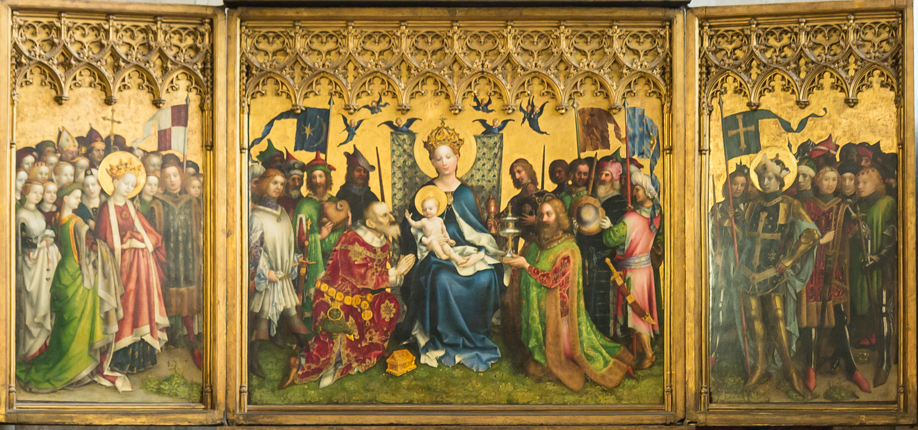 Vorstellung der Sonderbriefmarke „Weihnachten 2017“. Das Postwertzeichen zeigt einen Ausschnitt des von Stefan Lochner gestalteten Altars der Stadtpatrone in der Marienkapelle des Kölner Doms.